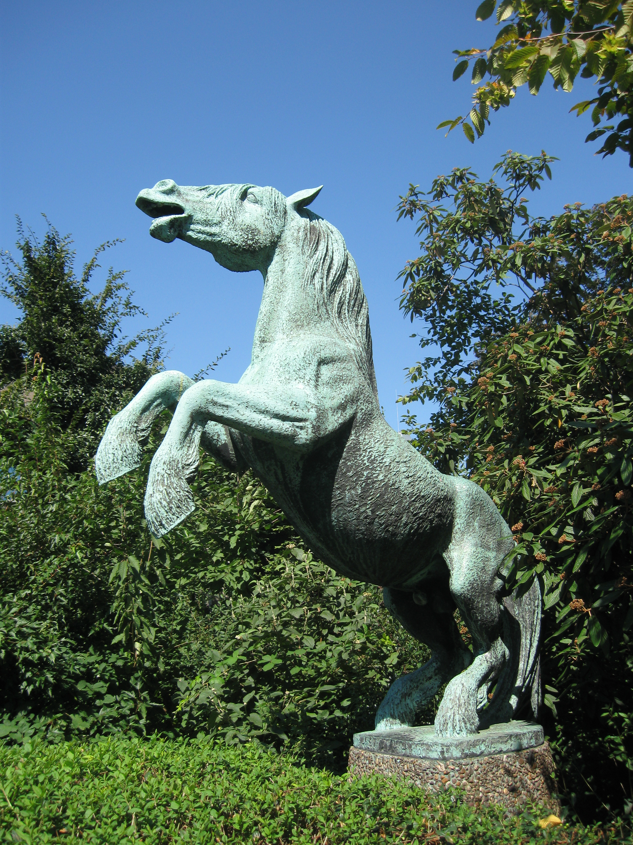 Springendes Emscherpferd (Wappentier von Herne und Wanne-Eickel) des Hagener Bildhauers Gustav Müller-Blankenstein (1905–1970) am Eingang zum Florapark in Herne-Wanne (Heidstraße 132), aufgestellt am 23. April 1960.[1]